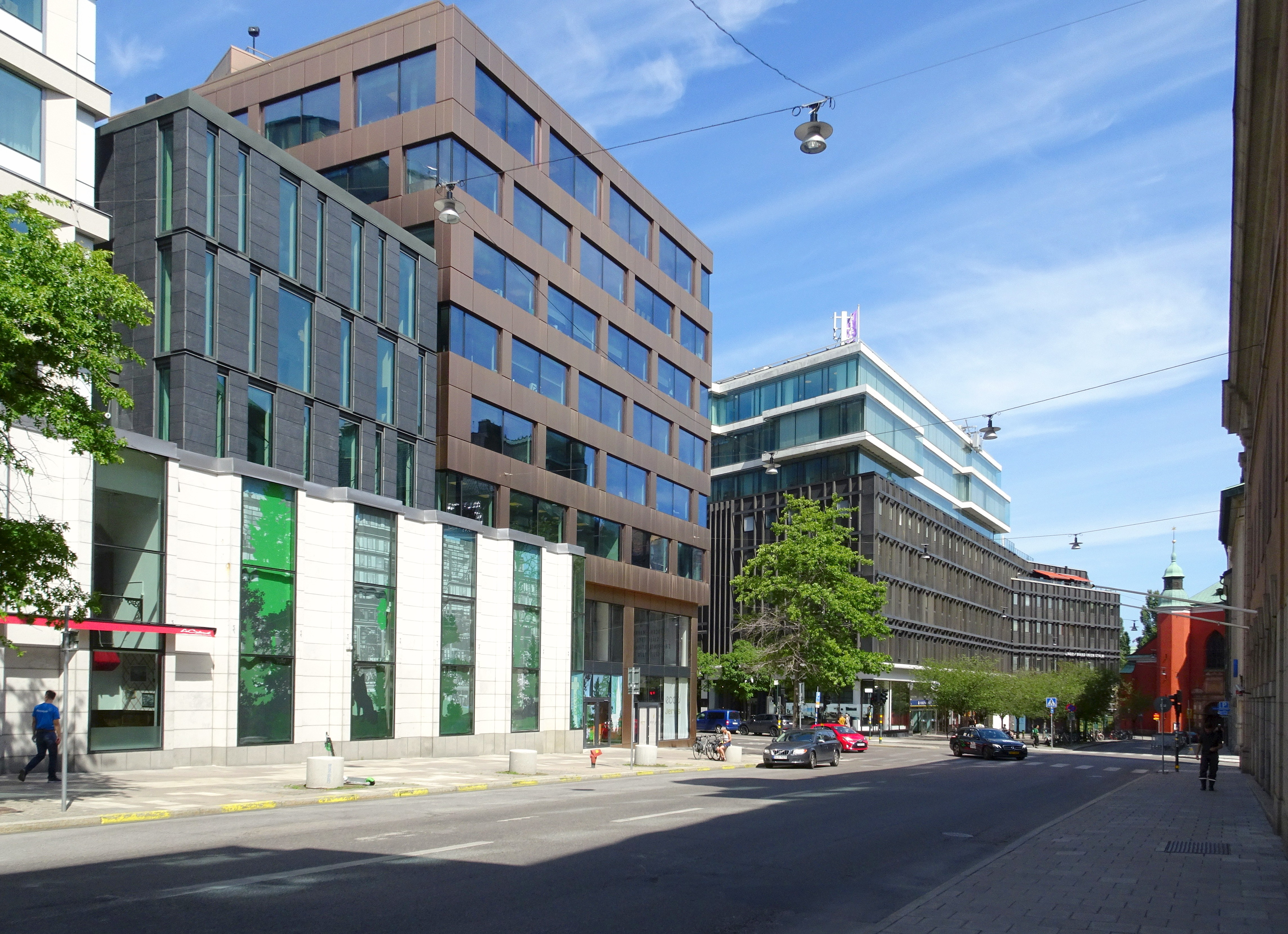 Jakobsgatan 6-12, Stockholm, t.v. Trollhättan 31 (Gallerian)